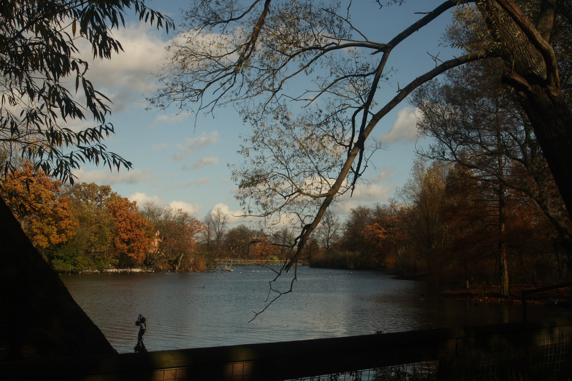 Tidal Lake Crystal Palace Park